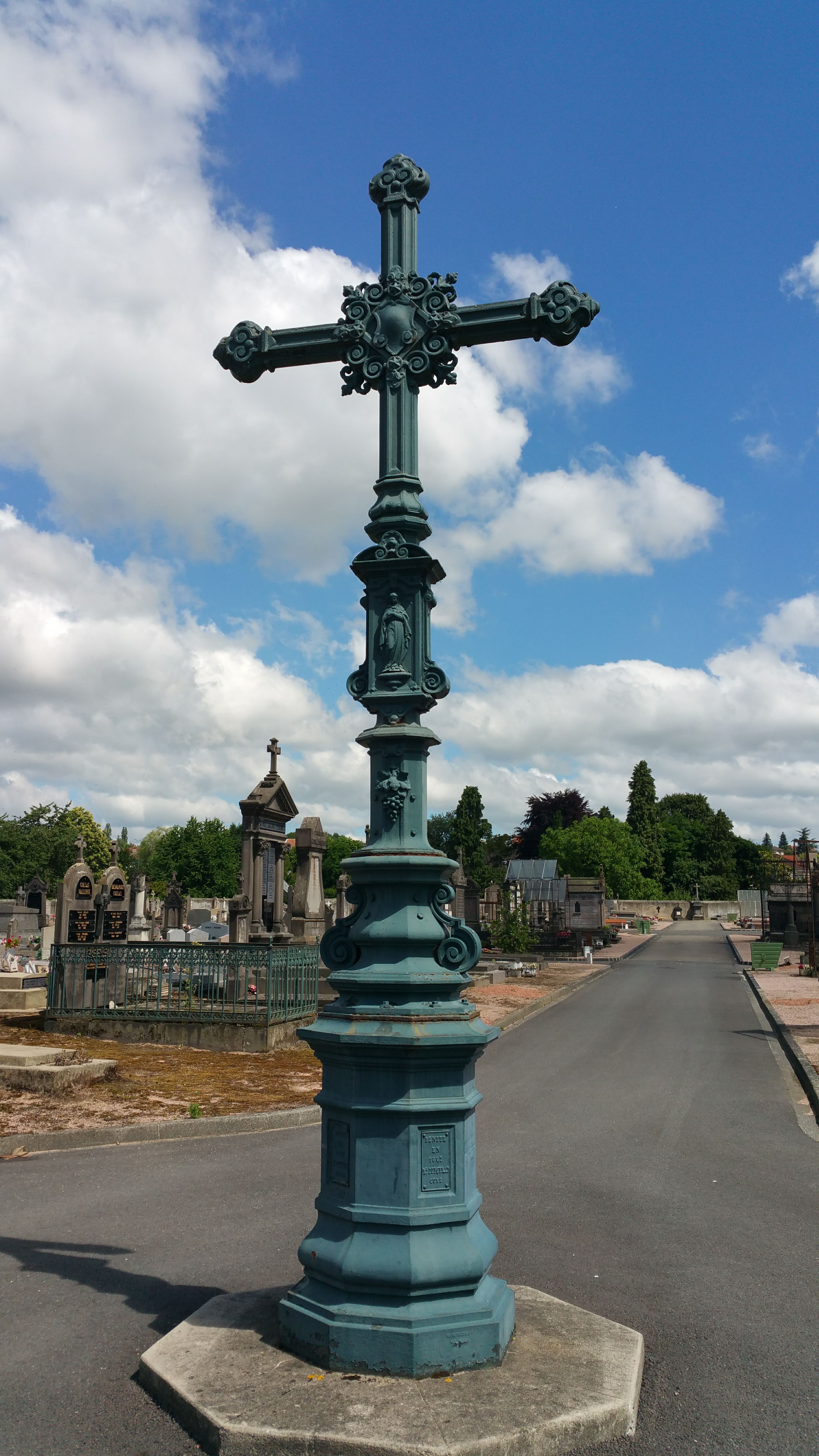 Grand croix en fonte du cimetière de Vichy, érigée en décembre 1866, peu de temps après la création du cimetière